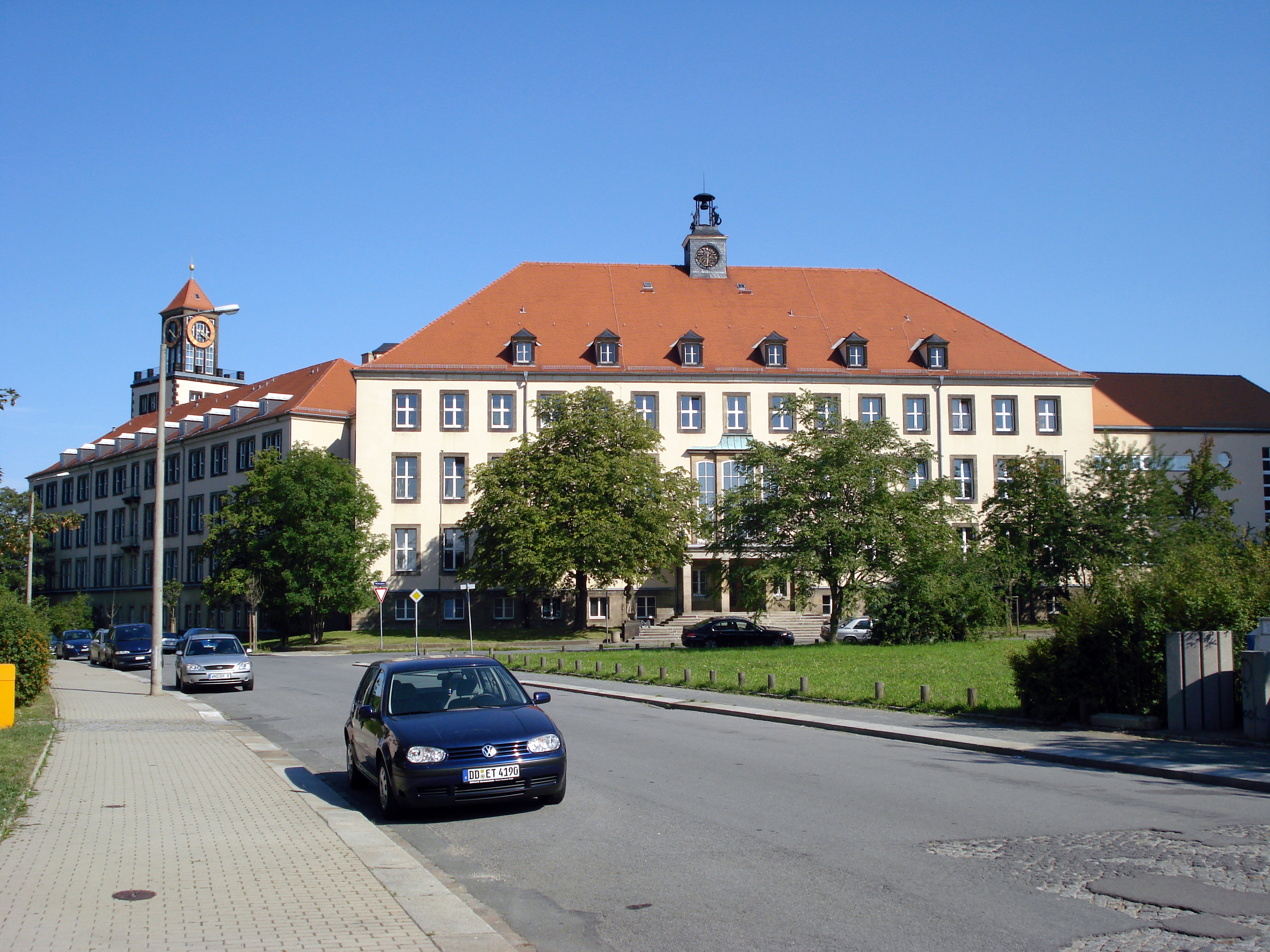 Weberplatz in Dresden, Blick zum Lehrgebäude Weberplatz der TU Dresden